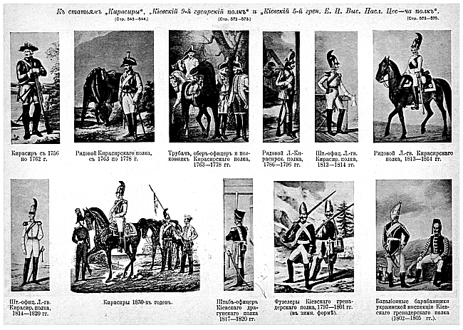 Эти изображения были использовано для иллюстрирования статей «Кирасиры», «Киевский, 9-й гусарский, полк», «Киевский, 5-й гренадерский, генерал-фельдмаршала князя Николая Репнина, ныне Е. И. Выс. Наследника Цесаревича, полк», опубликованных в двенадцатом томе «Военной энциклопедии», который был издан книгоиздательским товариществом И. Д. Сытина в 1913 году в столице Российской империи городе Санкт-Петербурге. Более подробное описание можно прочесть в указанных выше статьях.